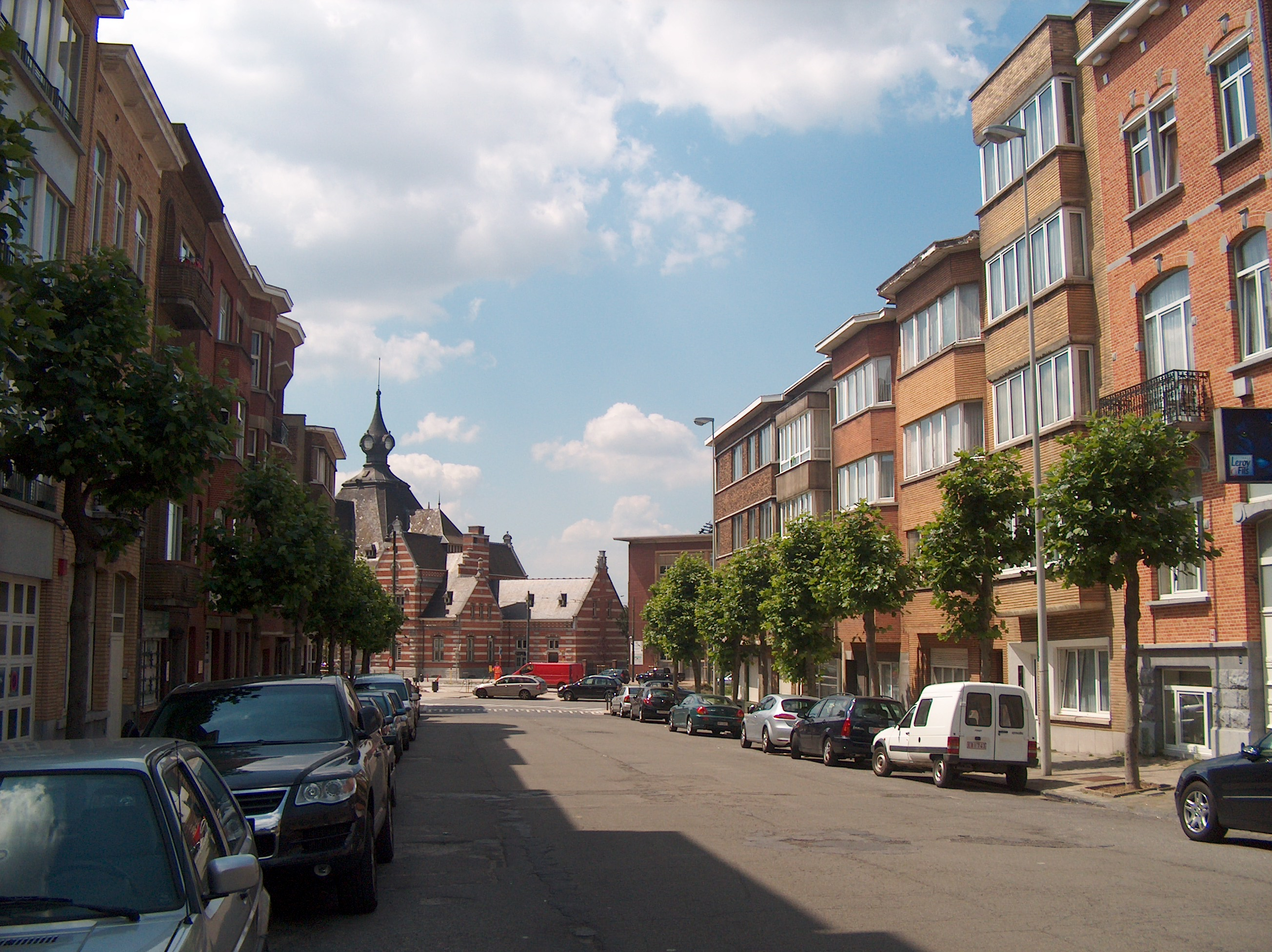 L'avenue Colonel Picquart à Schaerbeek, Bruxelles, Belgique.